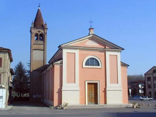 Foto chiesa di Rovereto sulla Secchia